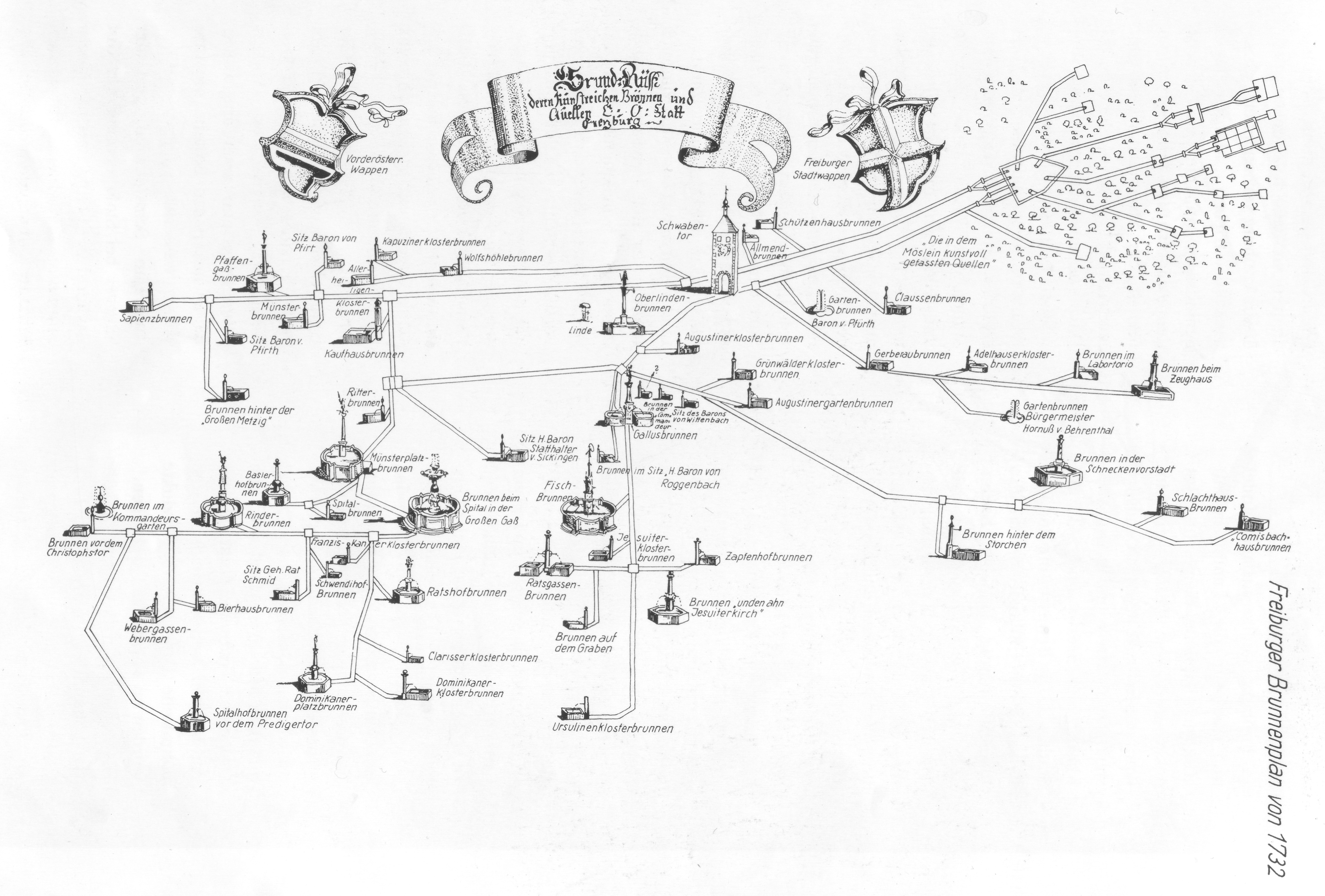 Freiburger Brunnenplan